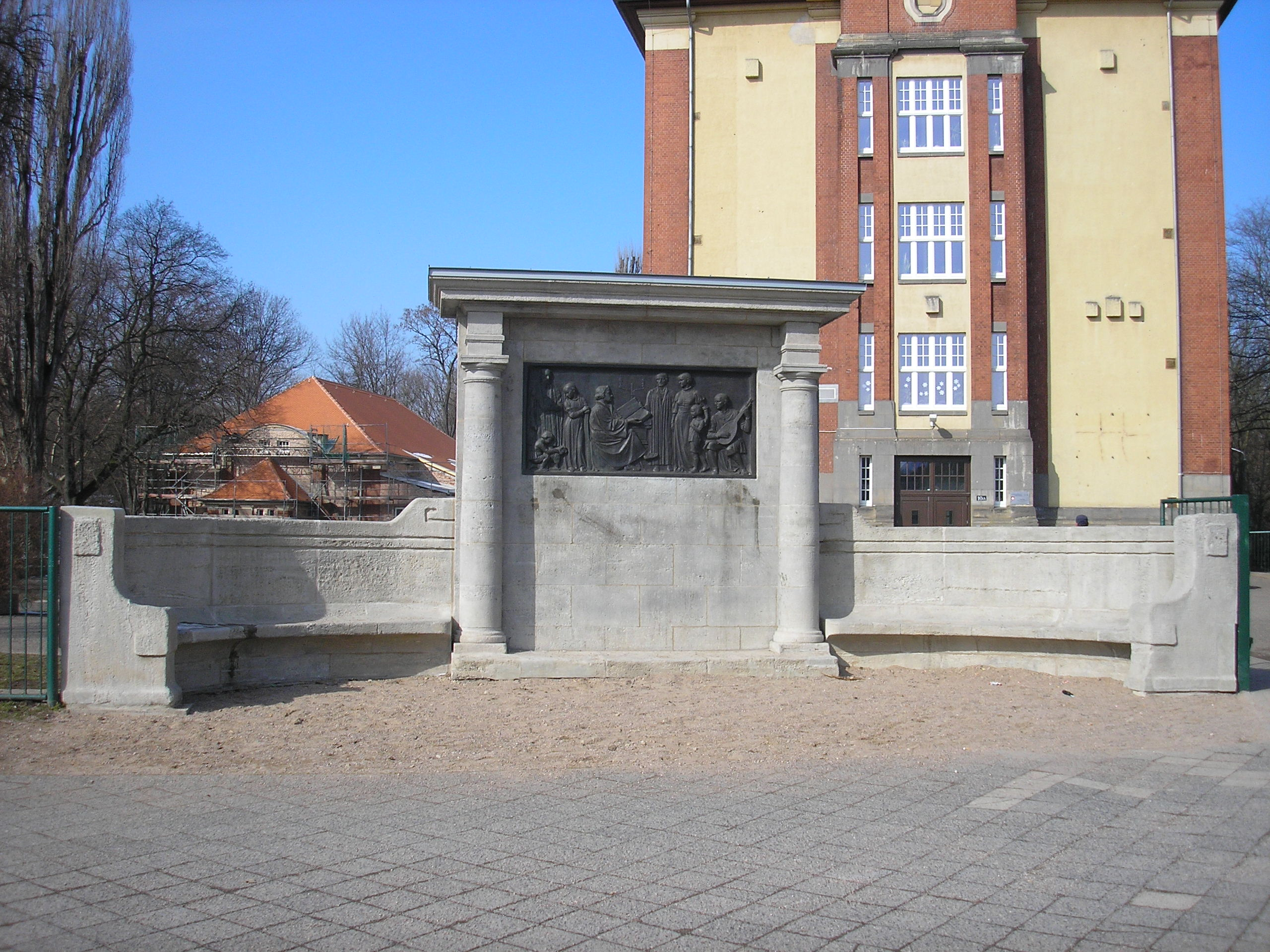 Das Lutherdenkmal an der Lutherschule in Erfurt.